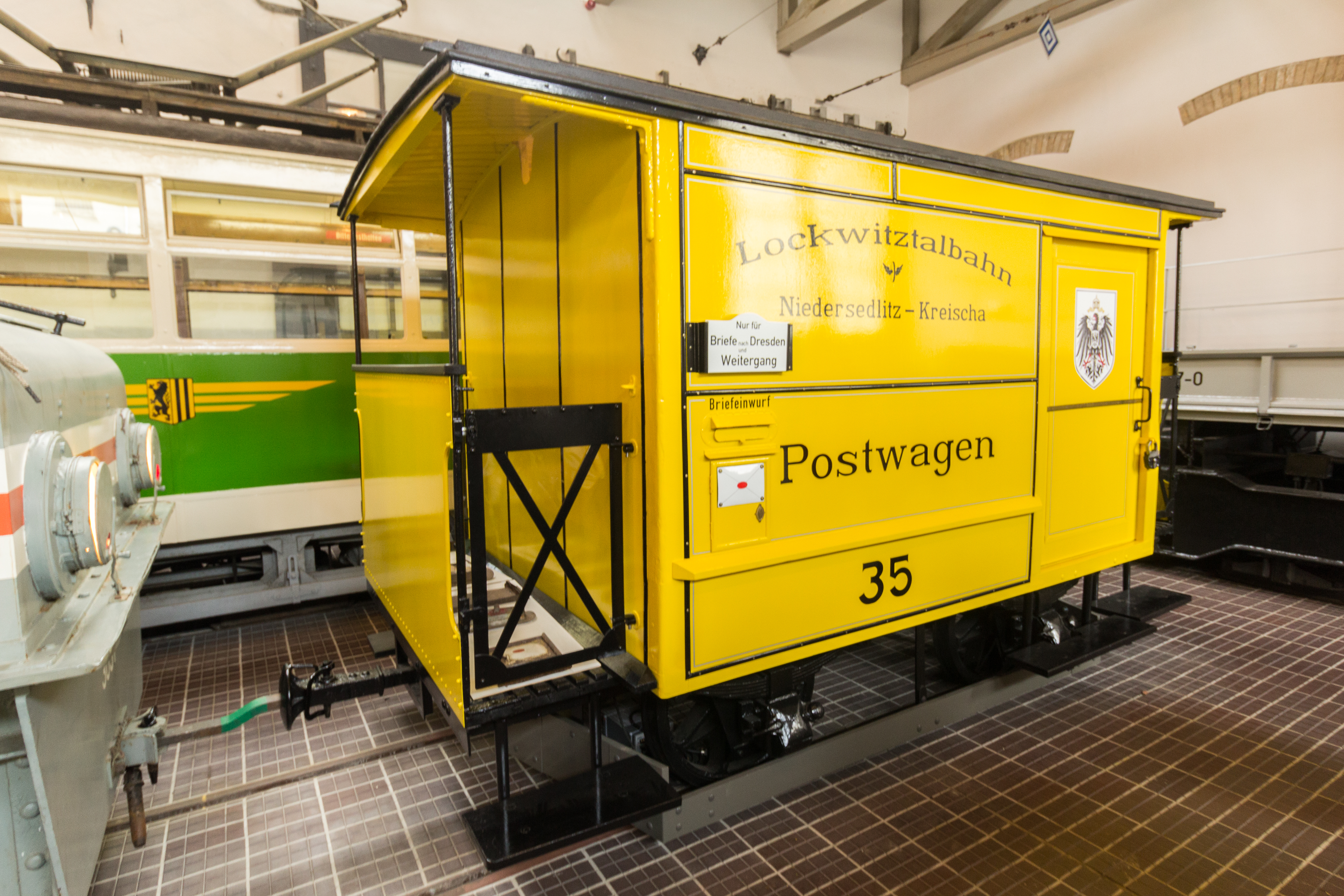 Postwagen Lockwitztalbahn - Straßenbahnmuseum Dresden